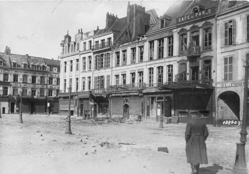 Douai am 2. Oktober nach erneuter feindlicher Beschießung. Der Marktplatz unter engl. Artilleriefeuer.